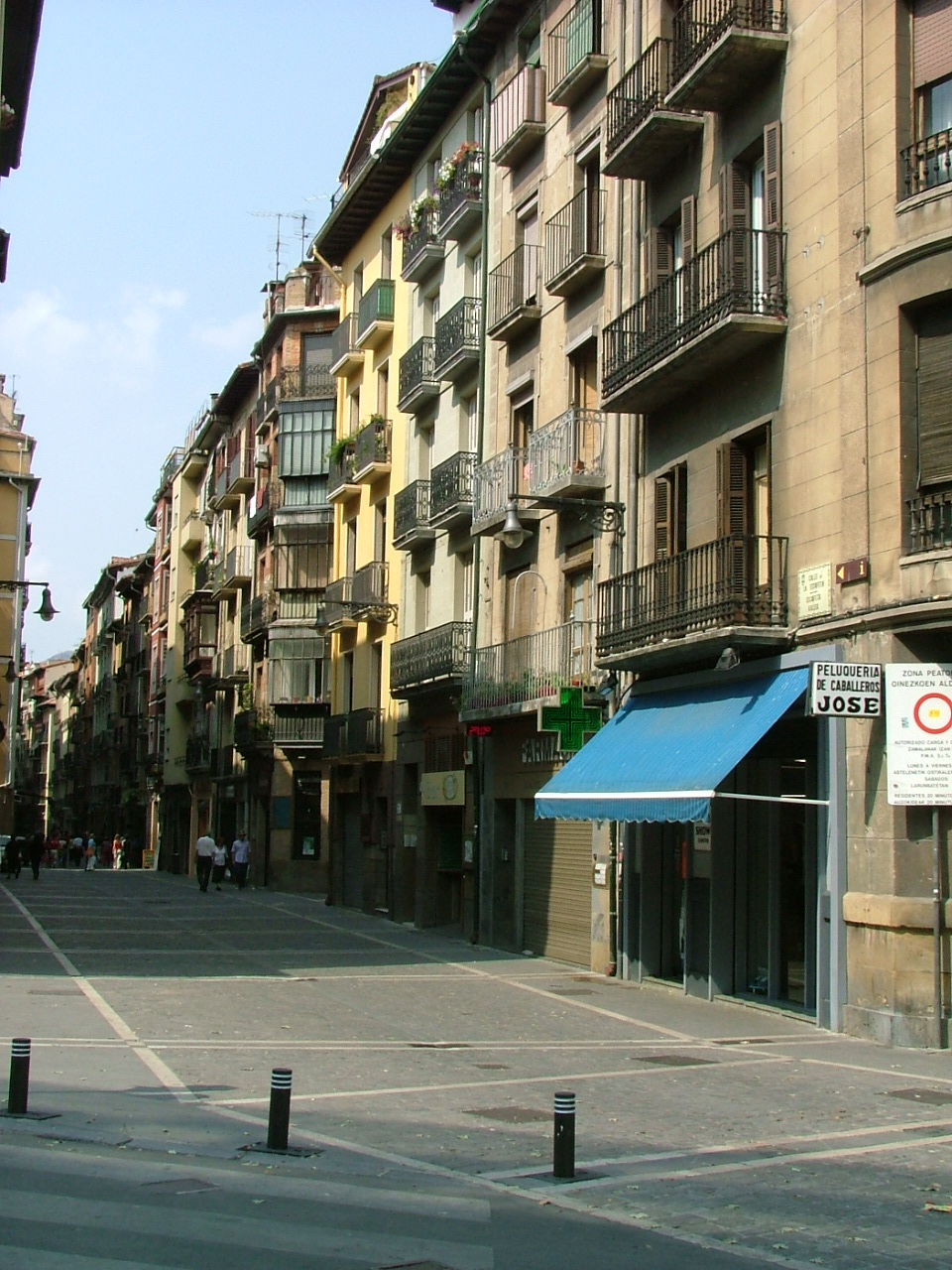 Vista de la calle Estafeta de Pamplona